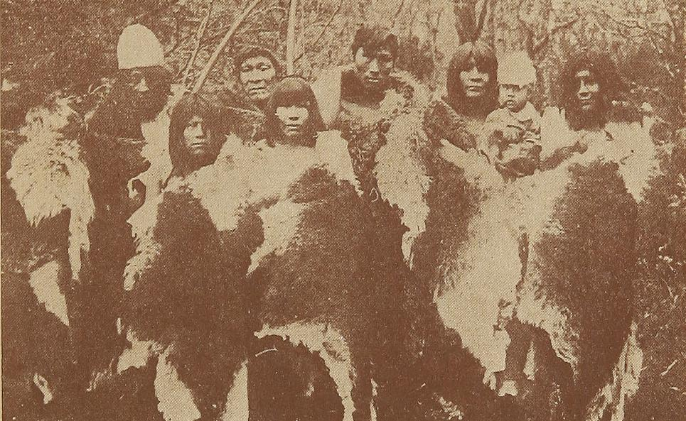 "Indios Onas luciendo sus típicas vestimentas."